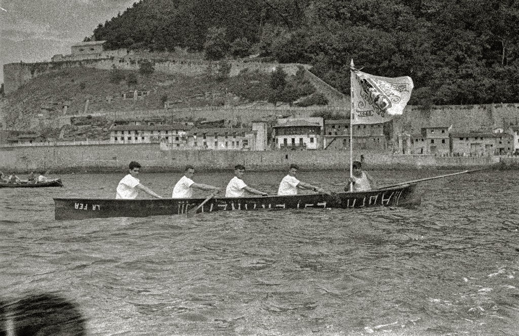 Título original: Batel del Club Deportivo Esperanza en la bahía de la Concha (1/1) Localización: San Sebastián (Guipúzcoa)